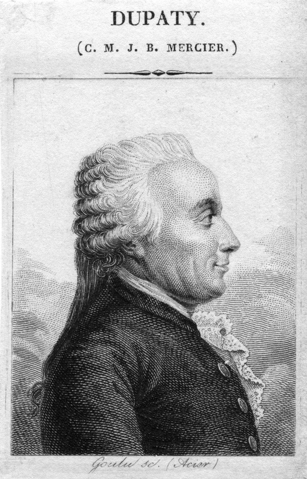 portrait gravé